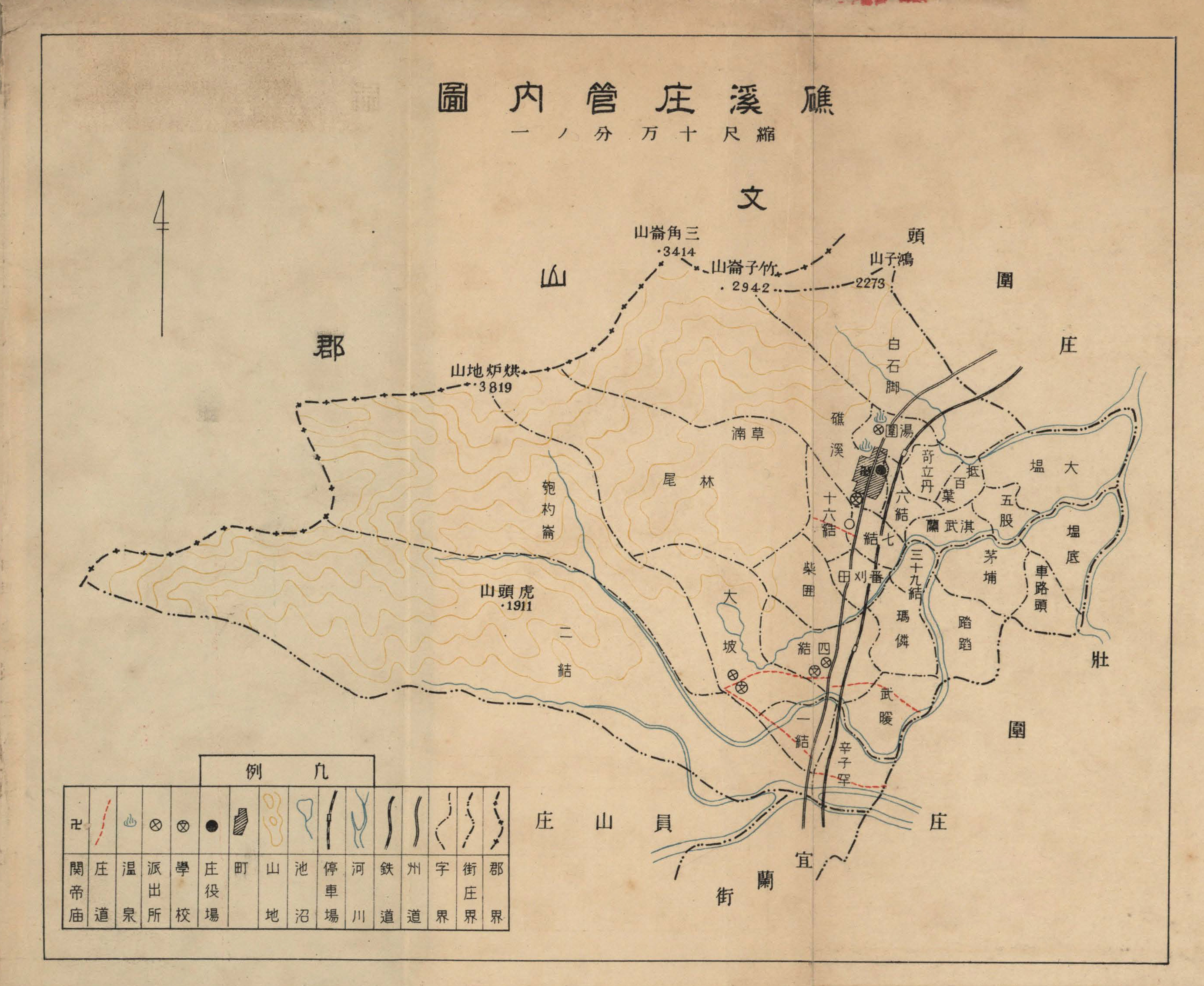 中文（台灣）: 台灣日治時期的礁溪庄為現今的宜蘭縣礁溪鄉